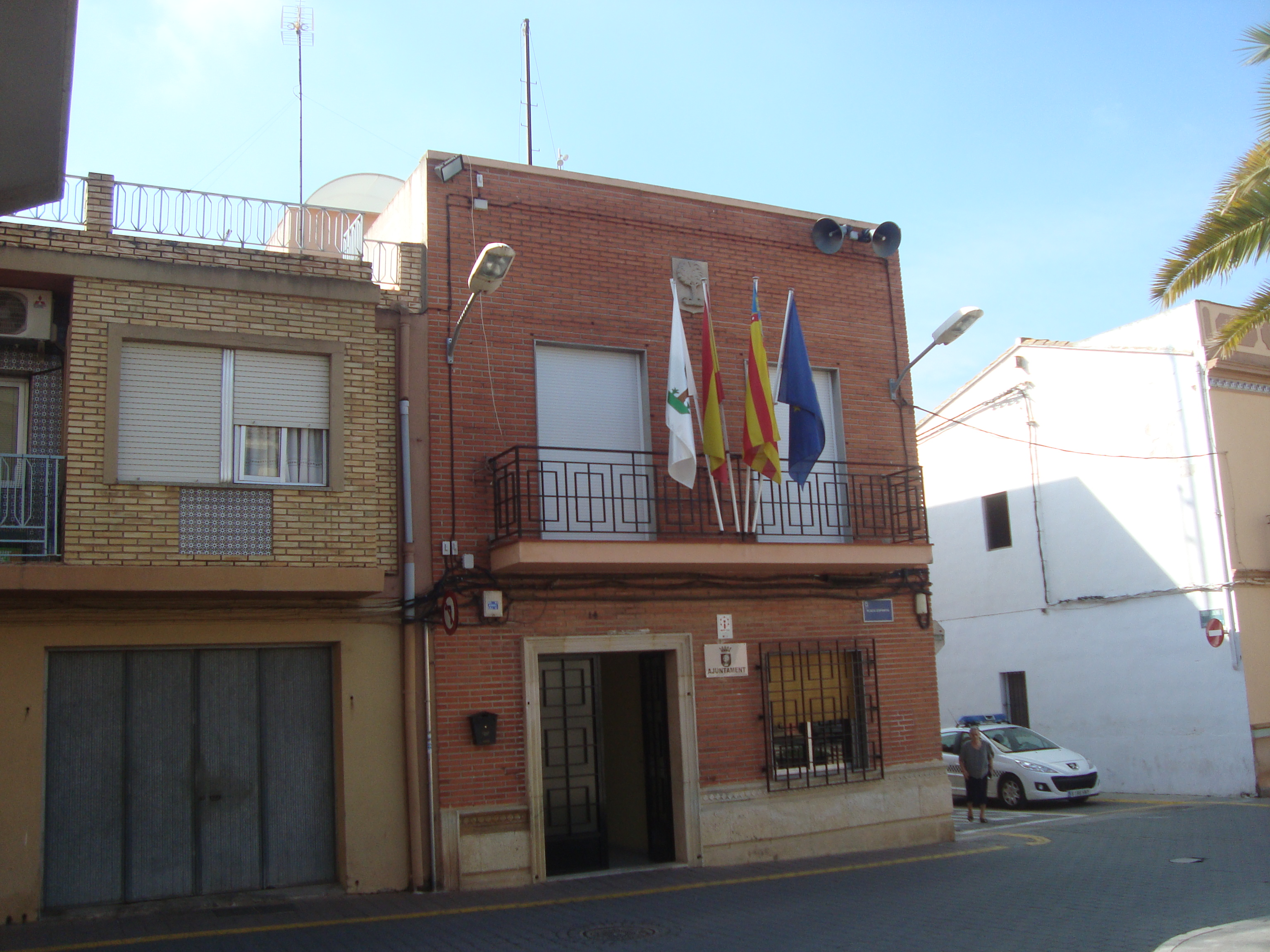 Ajuntament de La Llosa (Castelló)